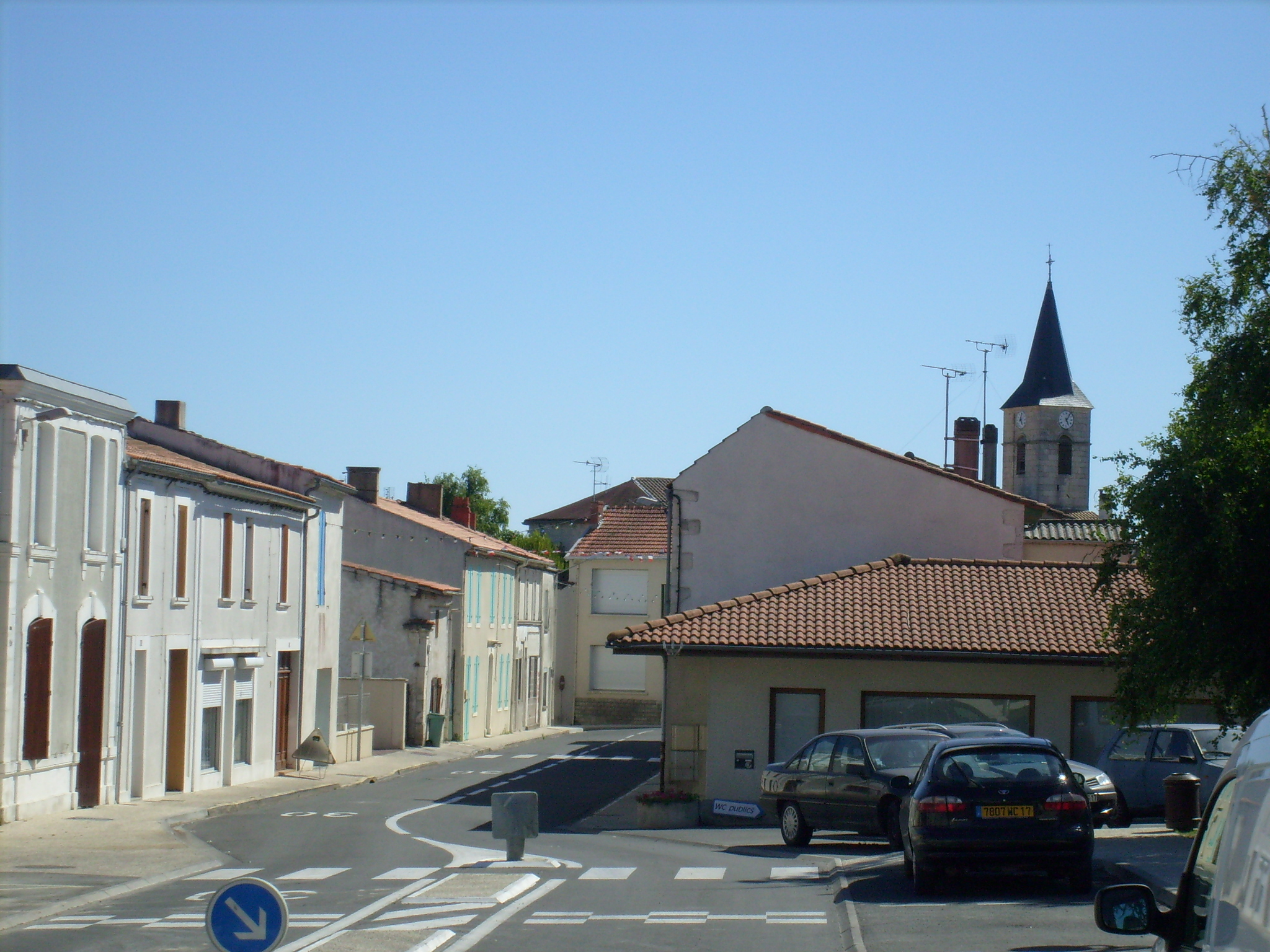 Centre-Bourg d'Arvert